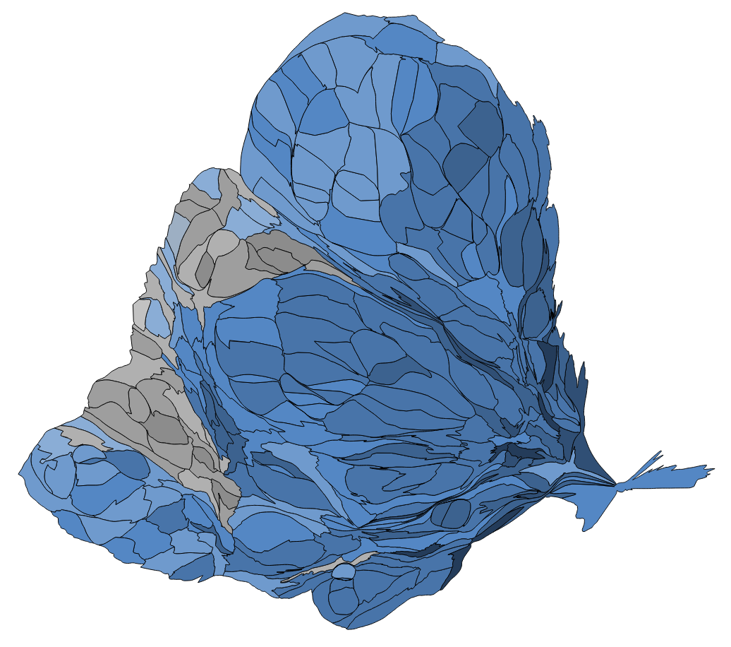 顏色對照表